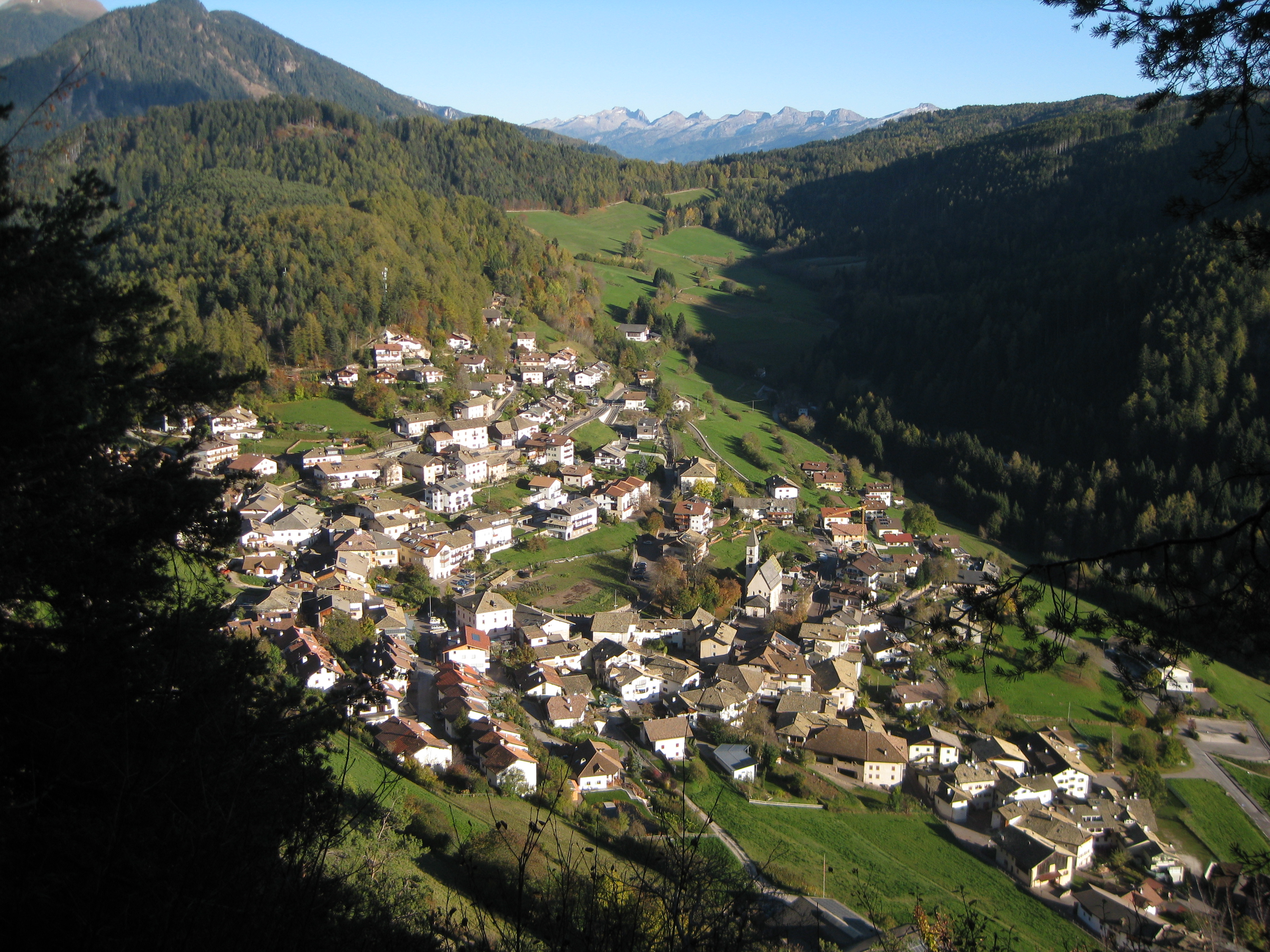 Truden in Südtirol vom Osthang des Cisloner Bergs gesehen